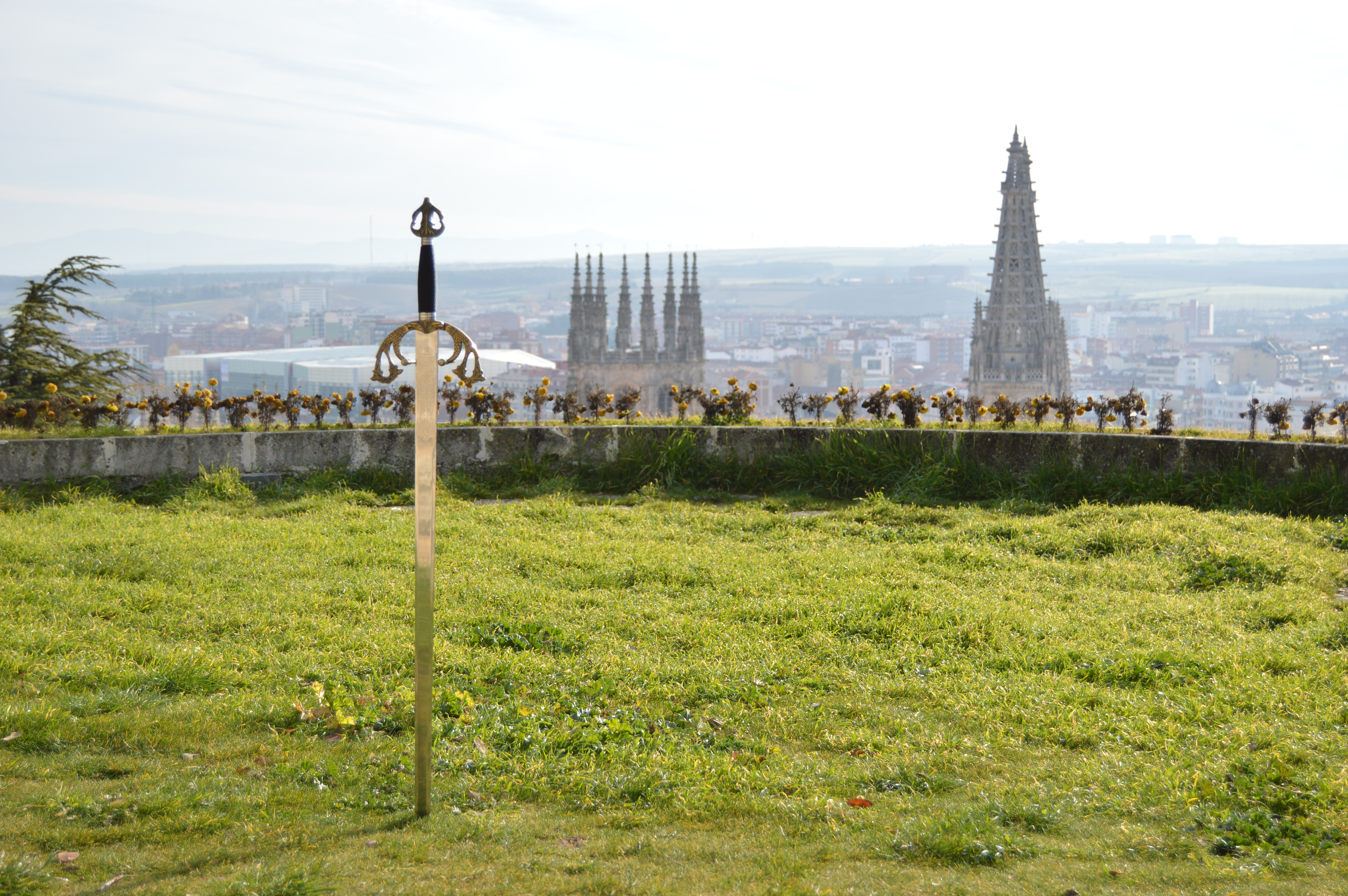 Romani čhib: Spada a lui Carol I